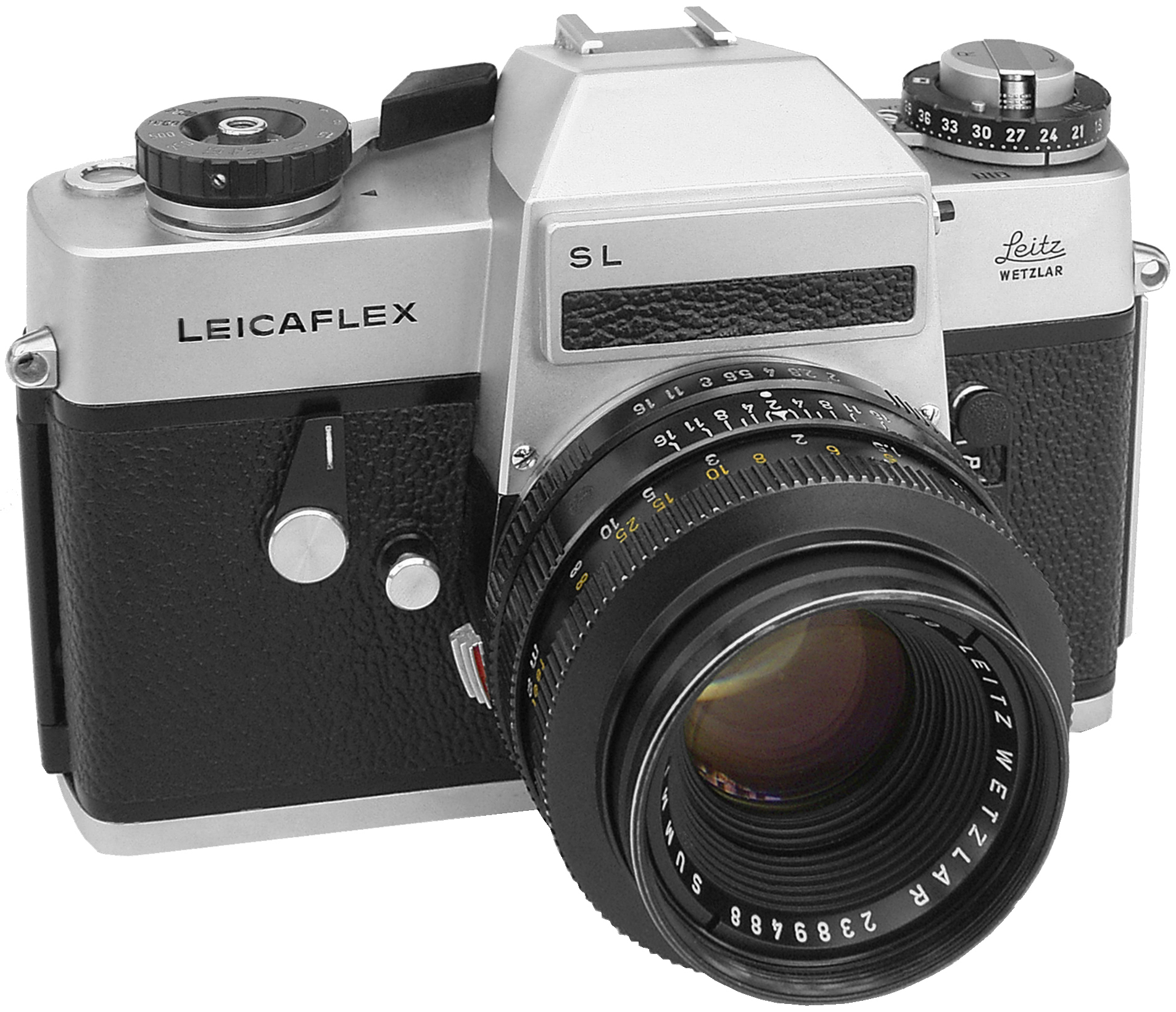 Das hat man nun davon. Der Ruf, eine Sammelstelle für alte Kameras zu sein, die hier einen sinnvollen Lebensabend verbringen können, läßt einem immer mehr alte Schätze zufliegen (ätsch ebay ;-)) Die neueste Errungenschaft: diese Leicaflex SL. Herzlichen Dank, Wolfgang! In Kürze: Die Leicaflex SL löste 1968 die Leicaflex ab, die noch eine Außenmessung hatte, immerhin CdS, die nie erschienene Ur-Leicaflex war noch mit Selen-Außenmessung konzipiert. So war die SL mit ihrer selektiven TTL-Belichtungsmessung mit Offenblende zunächst durchaus auf der Höhe der Zeit. Aber die fernöstliche Konkurrenz schlief nicht und war auf dem Gebiet der Automatisierung von Kameras dynamischer als Leitz. So tat man sich vernünftigerweise 1976 mit Minolta zusammen und entwickelte gemeinsam die R3 mit Zeitautomatik, die der XE-1 von Minolta sehr ähnlich war. Mit der R3 begann die R-Reihe der Leica-Spiegelreflexkameras, die erst 2009 mit der R9 eingestellt wurde. Zurück zur SL: Über alle Zweifel erhaben sind die Robustheit, Präzision und Zuverlässigkeit der Leicaflex. Das hört man auch - volles sattes Auslösegeräusch. Allerdings drückt sich das auch im Gewicht aus: fast 1100 g mit dem Summicron-R 1:2/50. Aber immerhin 1/2000 Sekunde - und die Zeiten kann man stufenlos einstellen, Blitzsynchronisation 1/90 Sekunde. Das Summicron ist das beste 50er Normalobjekiv der Welt (sagen die Leica-Freunde). Gut, es ist mit Sicherheit eins der besten. Vielleicht kommen bald Weitwinkel- und Tele-Elmare und Summicrone angeflogen - es wird ihnen gut gehen auf meiner Seite - ehrlich ;-))